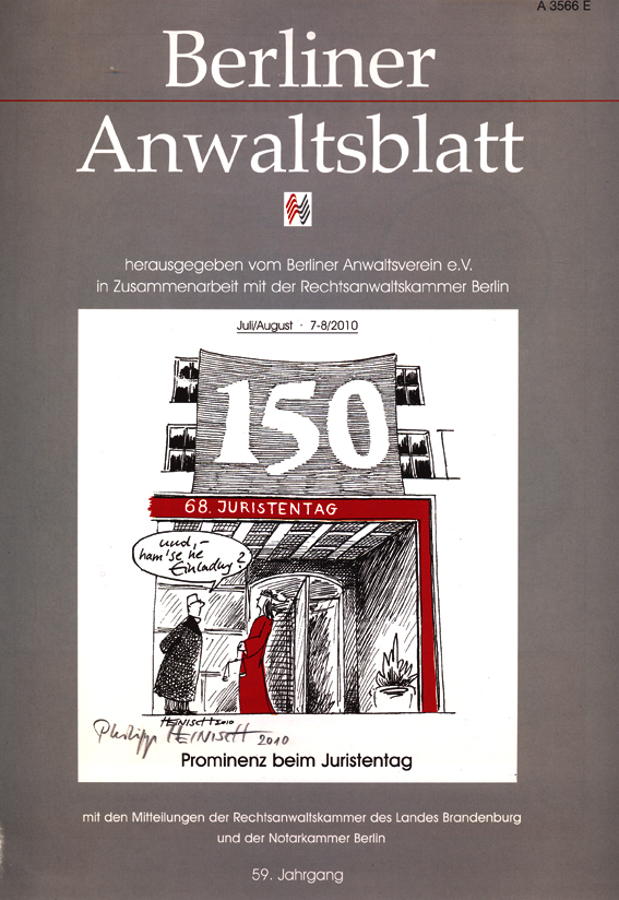 Philipp Heinisch, 150 Jahre Juristentag, 2010, kolorierte Federzeichnung, 30 x 20 cm, Titelblatt Berliner Anwaltsblatt vom August 2010